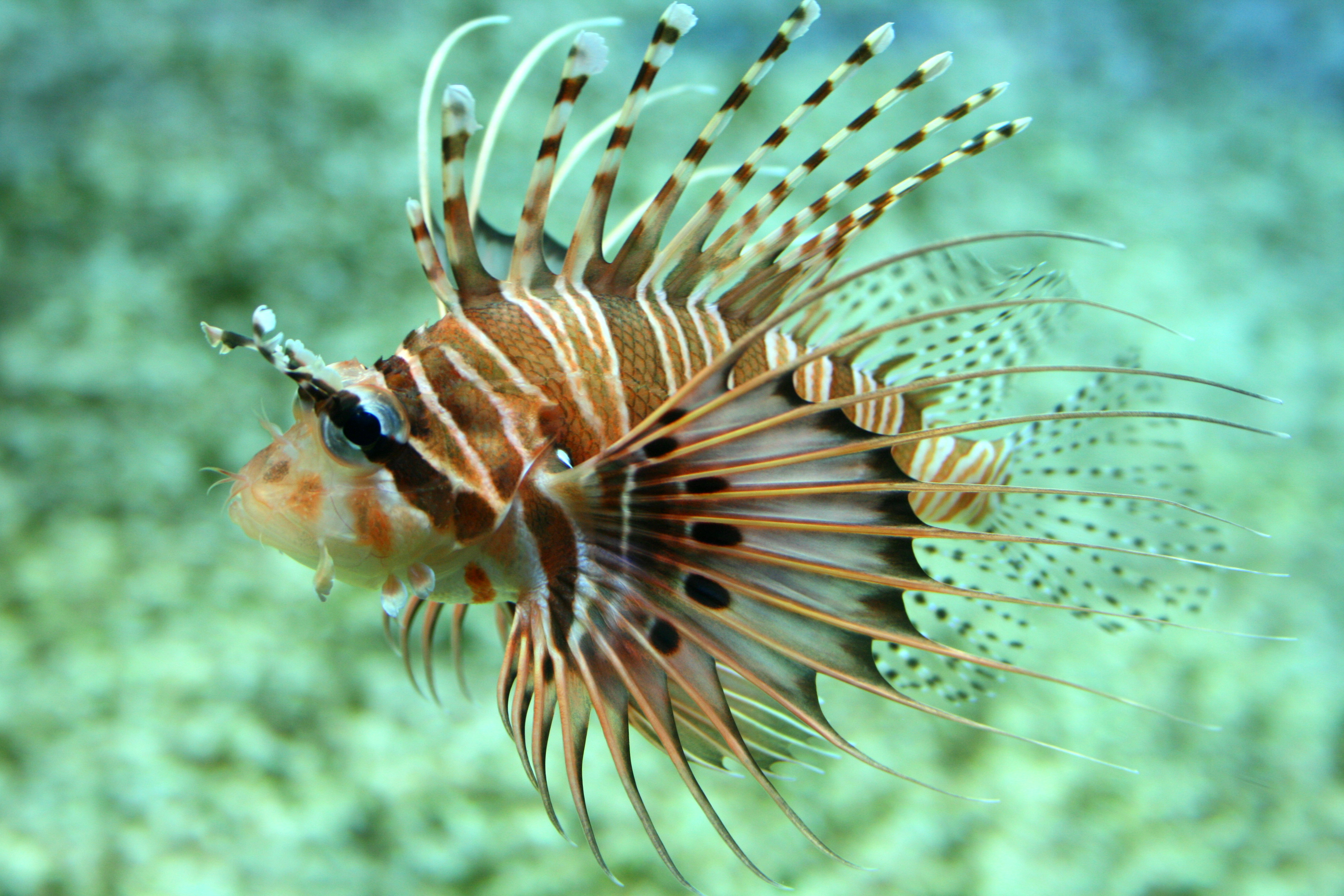 Antennen-Feuerfisch (Pterois antennata) im Tierpark Hagenbeck in Hamburg